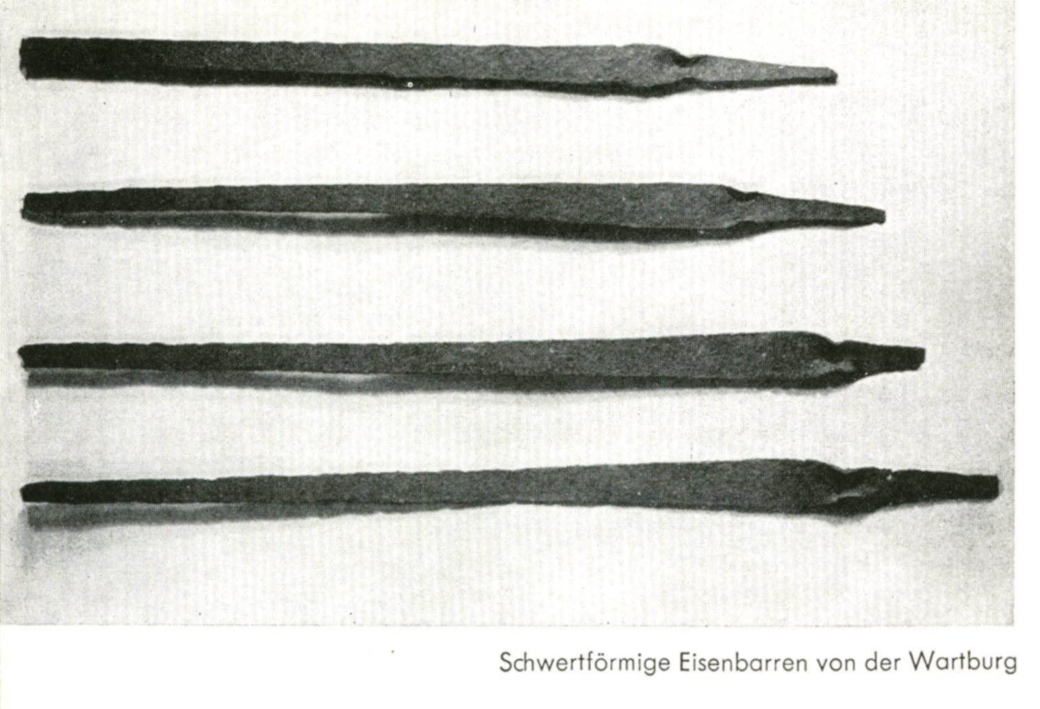 Foto zeigt 4 im Thr. Museum Eisenach aufbewahrte "SCHWURSCHWERTER DER WARTBURG" - damals (1964- ca. 1984) Teil der Dauerausstellung zur Ur- und Frühgeschichte des Kreises Eisenach.